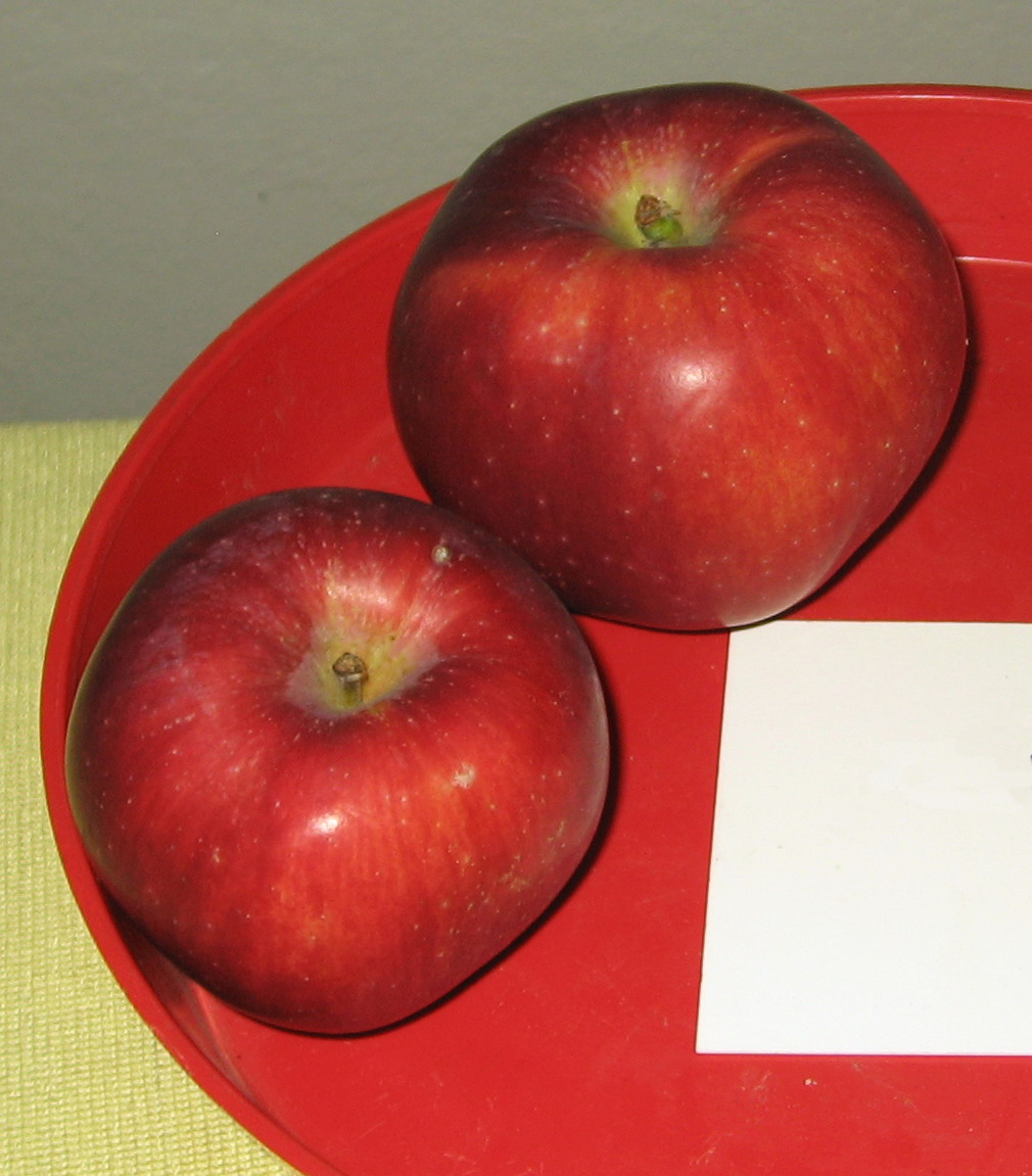 odrůda Sparťan